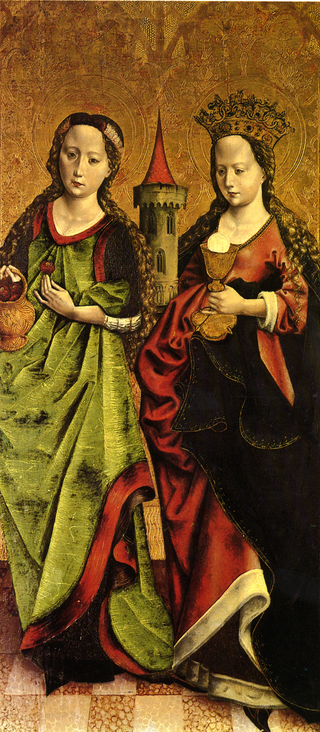 Die heilige Katharina und die Heilige Genoveva. Oberrhein, Mischtechnik auf Nadelholz, 95,2 x 70,7 cm (Fragment)